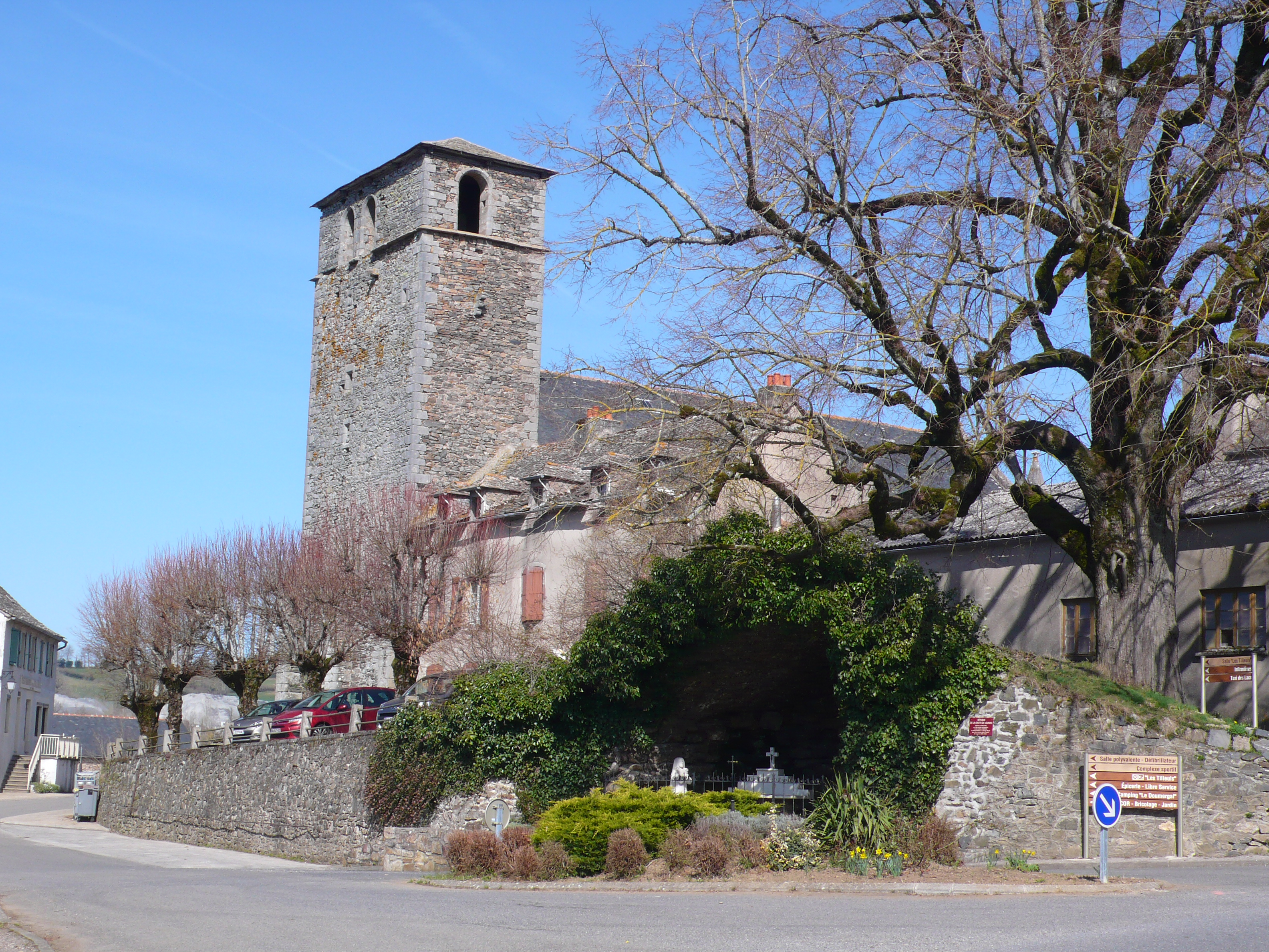 L'église d'Arvieu (Aveyron, France), du XIVe siècle.